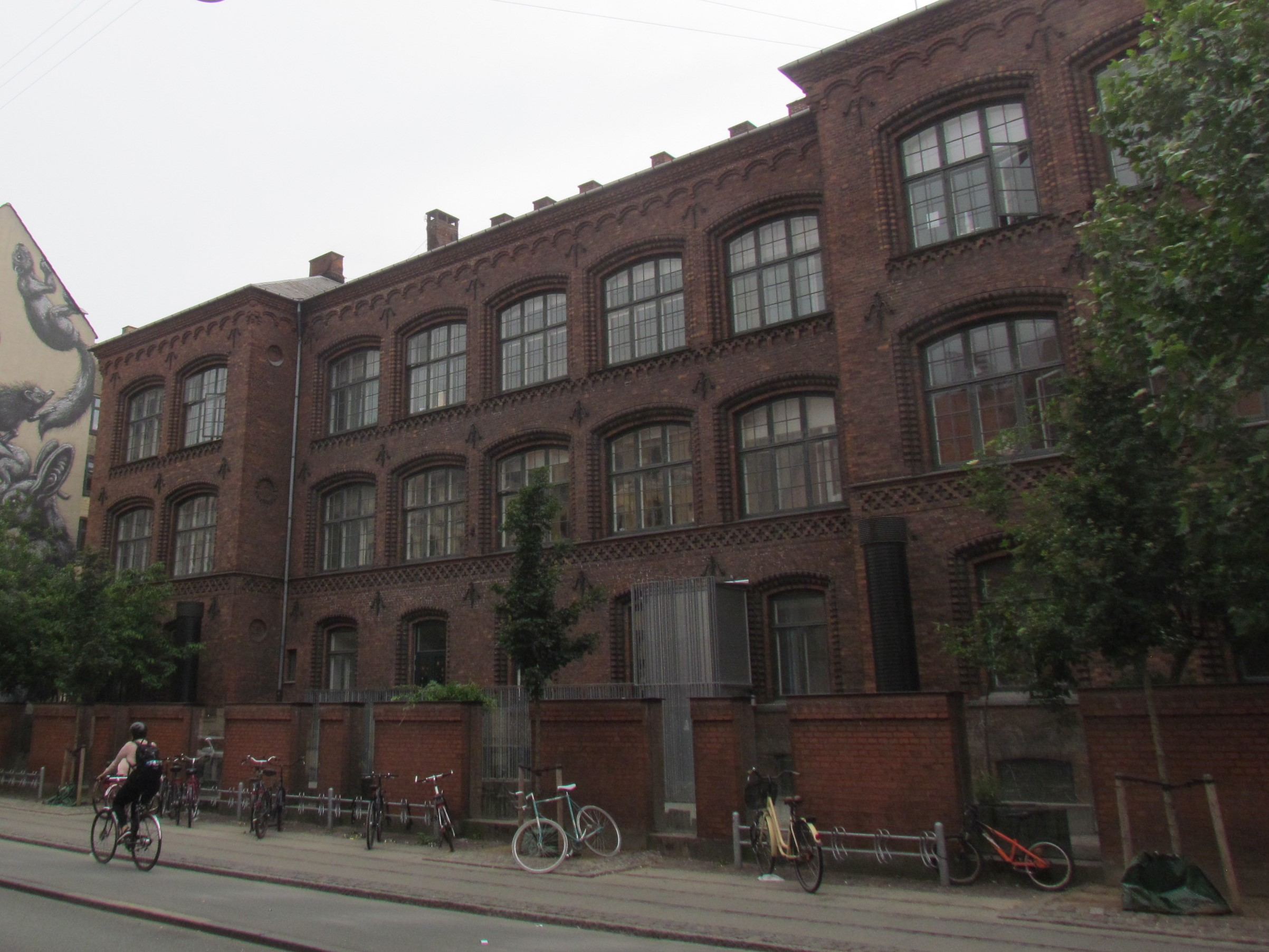 Gasværksvejens Skole in Copenhagen, Denmark